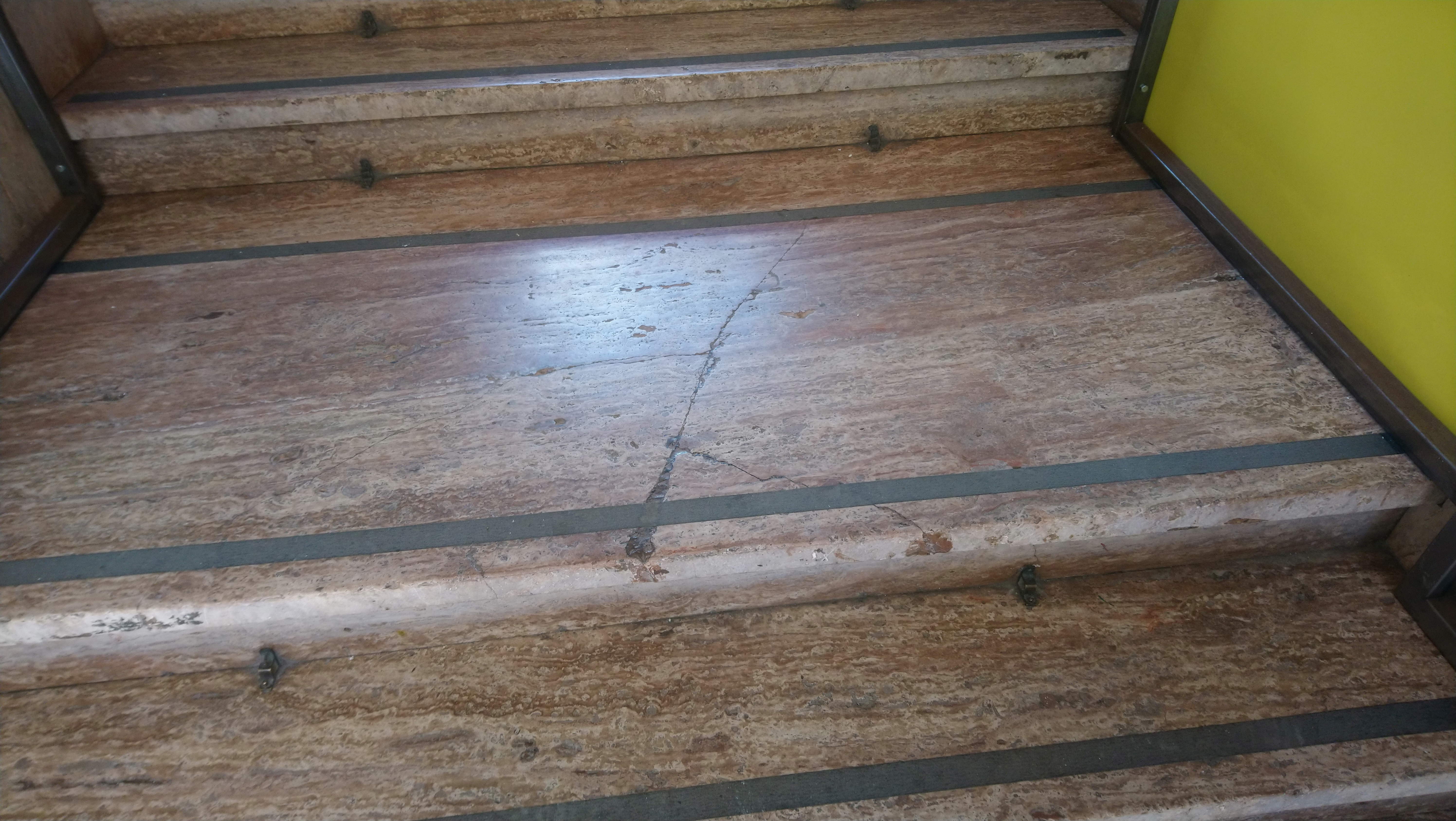 Escalón roto en la Escuela de Artes de Almería